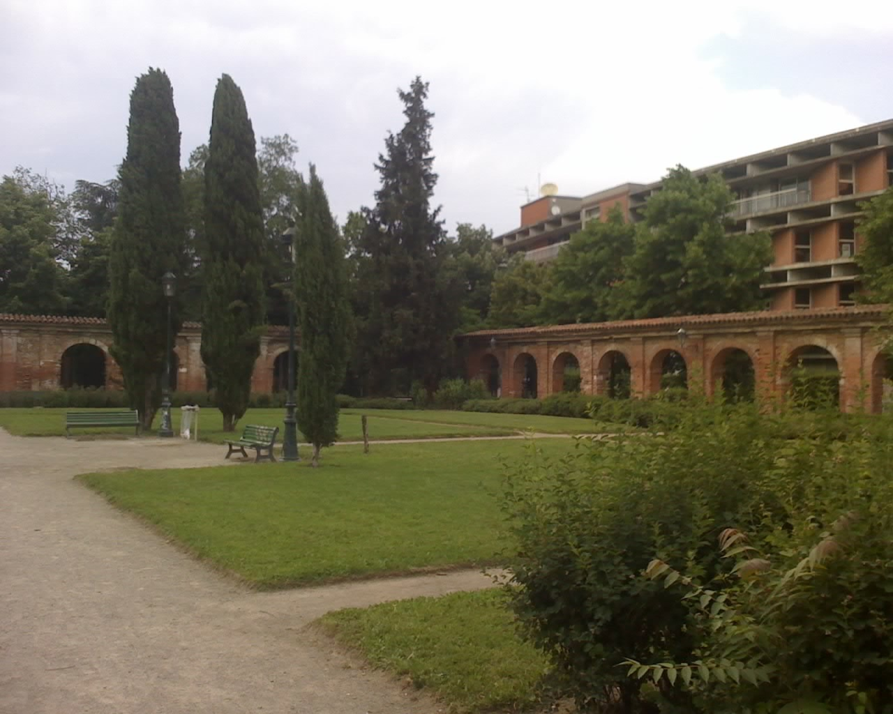 Cloître de l'ancien couvent des Chartreux à Toulouse (Haute-Garonne, France).